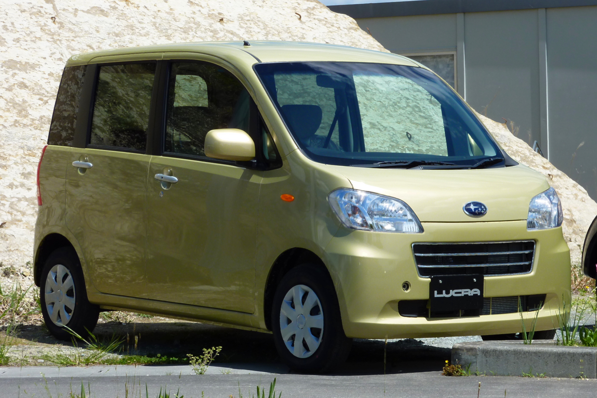 スバル・ルクラ